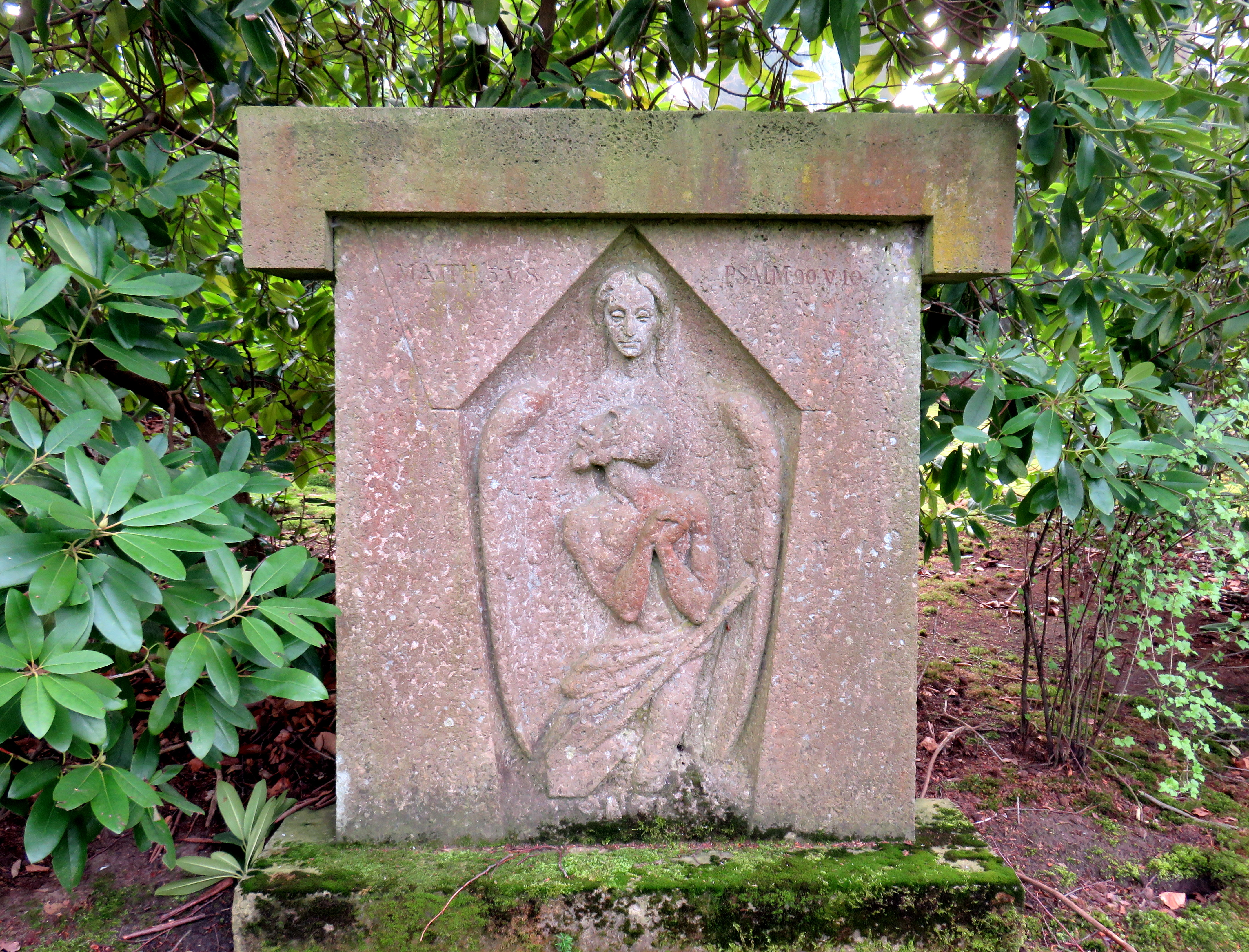 Grab Huminius auf dem Hamburger Friedhof Ohlsdorf, Planquadrat AD 12, 67-76 (östlich Riedemann-Mausoleum). Das Grabsteinrelief Engel mit Totengräber wurde 1920 vom deutschen Bildhauer Martin Irwahn (1898-1981) geschaffen.